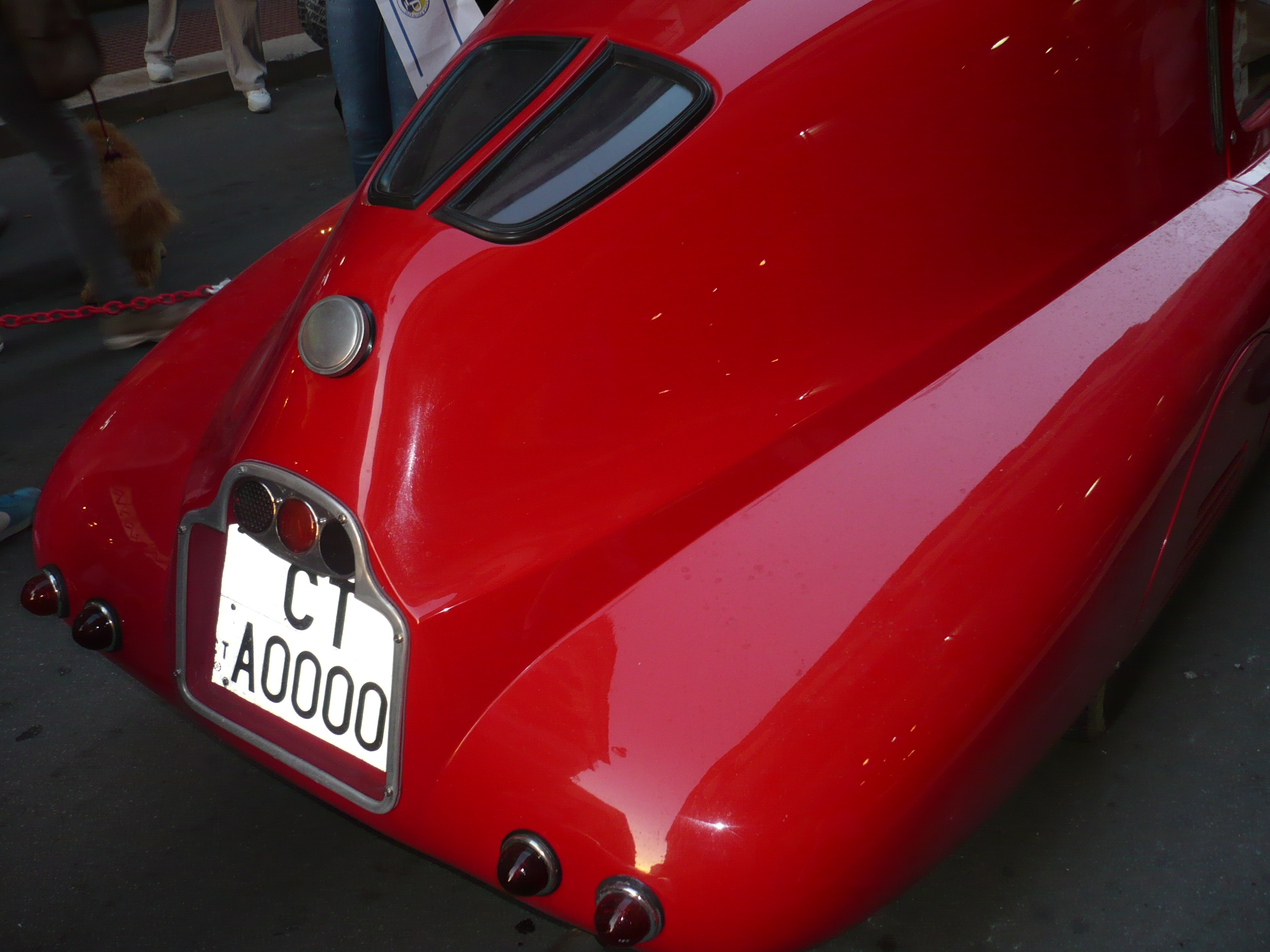 Posteriore della Fiat 508 CS MM o berlinetta Mille Miglia prodotta nel 1938 su meccanica della Spider Sport del 1934, mentre la carrozzeria è quella di una berlinetta biposto aerodinamica, pensata per le corse in climi rigidi come appunto la Mille Miglia. Motore Fiat 108C da 4 cilindri in linea di 995 cm³ a valvole laterali, con carburatore Solex mono corpo. Sospensioni: ant. e post. ad assale rigido, con balestre semiellittiche.